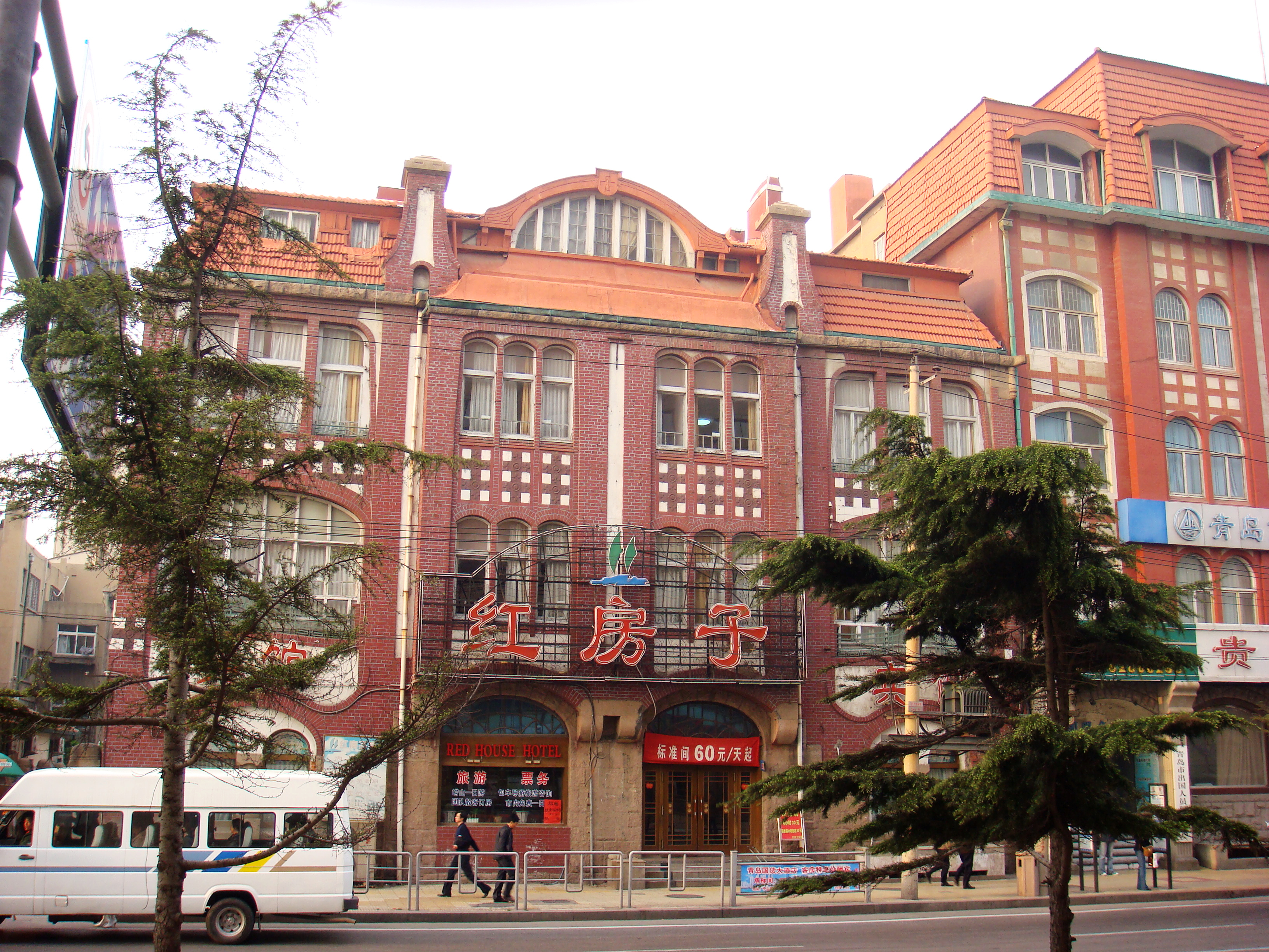 青岛医药商店旧址，南面。